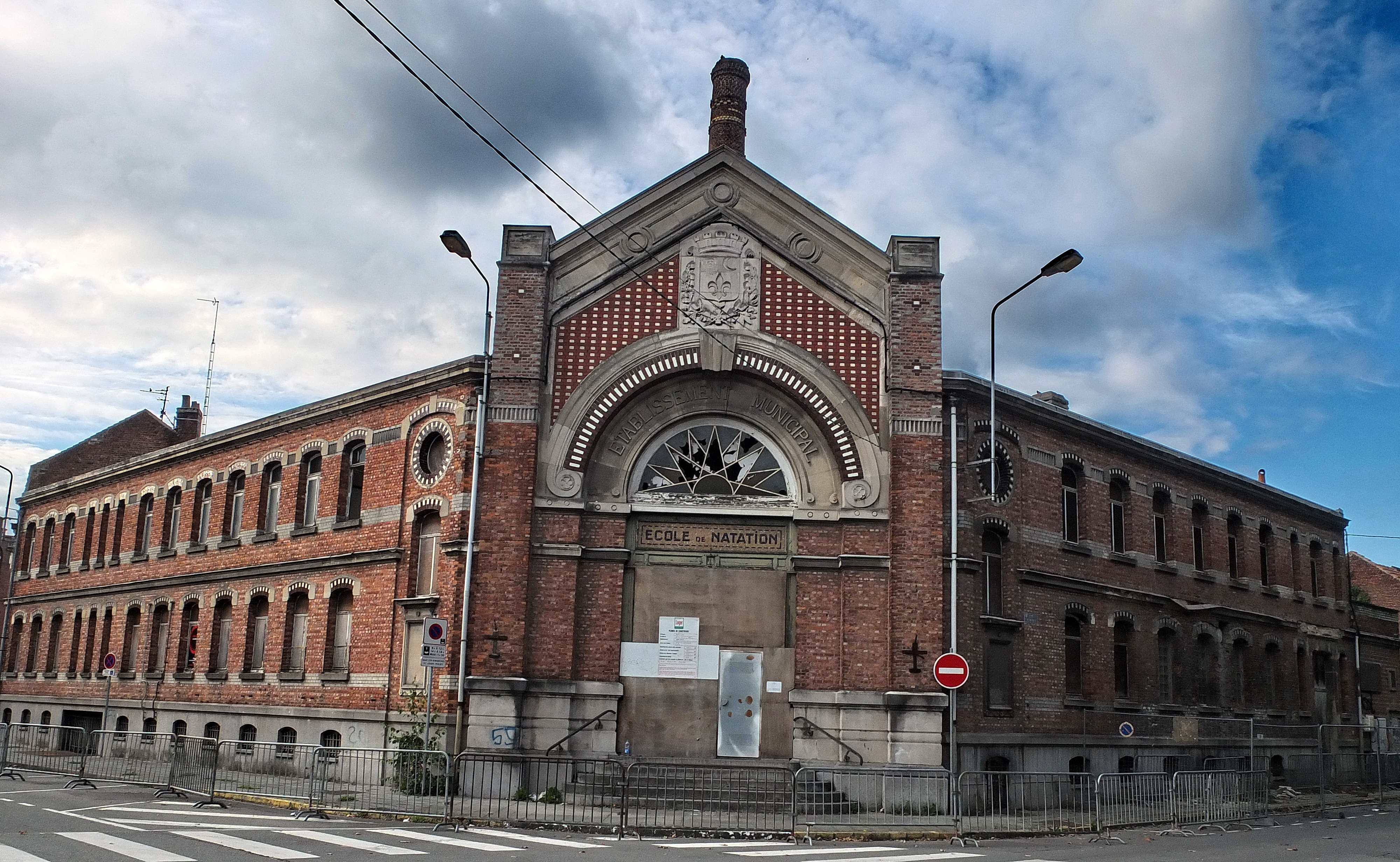 Armentières, ancienne piscine, 2 place Victor-Hugo. Auteur des plans : Philippe Edmond (ingénieur) - Fin des travaux :1891. Style architectural : Néo-classicisme.